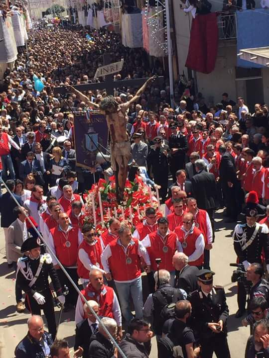 Crocifisso di Gesù nel maggio 2016